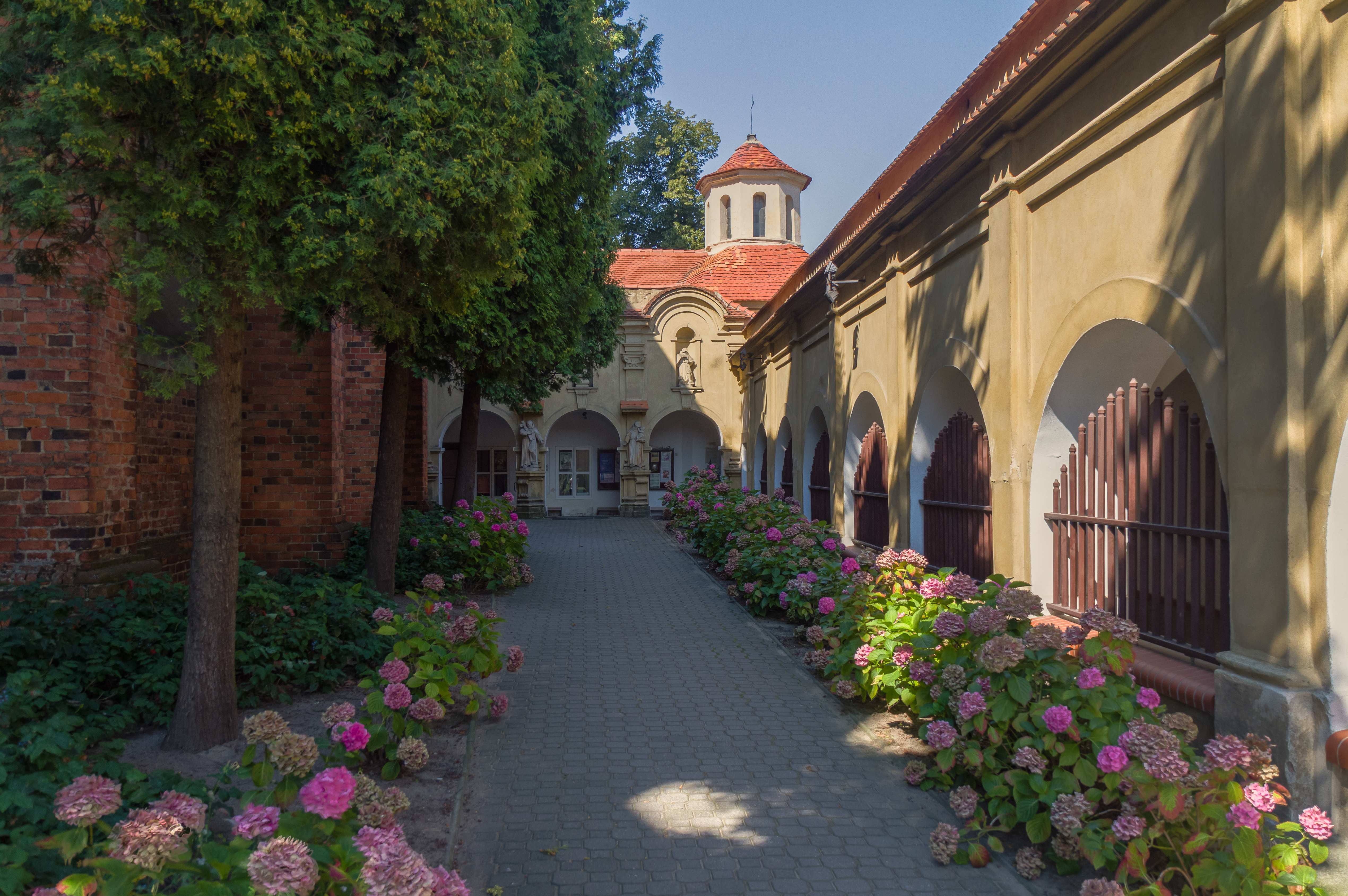 Wschowa, klasztor, 1629, 1730, XIX